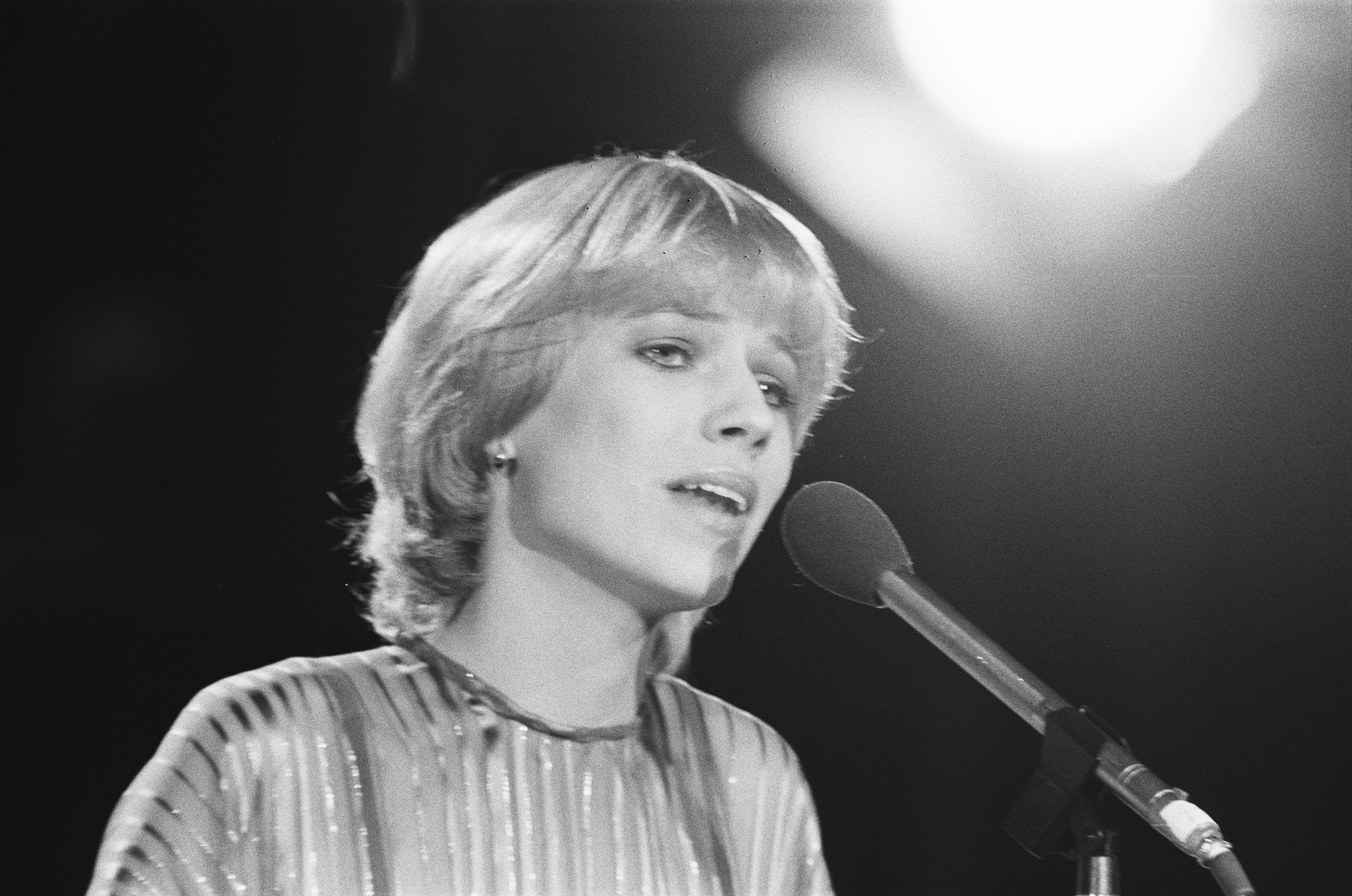 Kimm tijdens het Nationaal Songfestival 1978